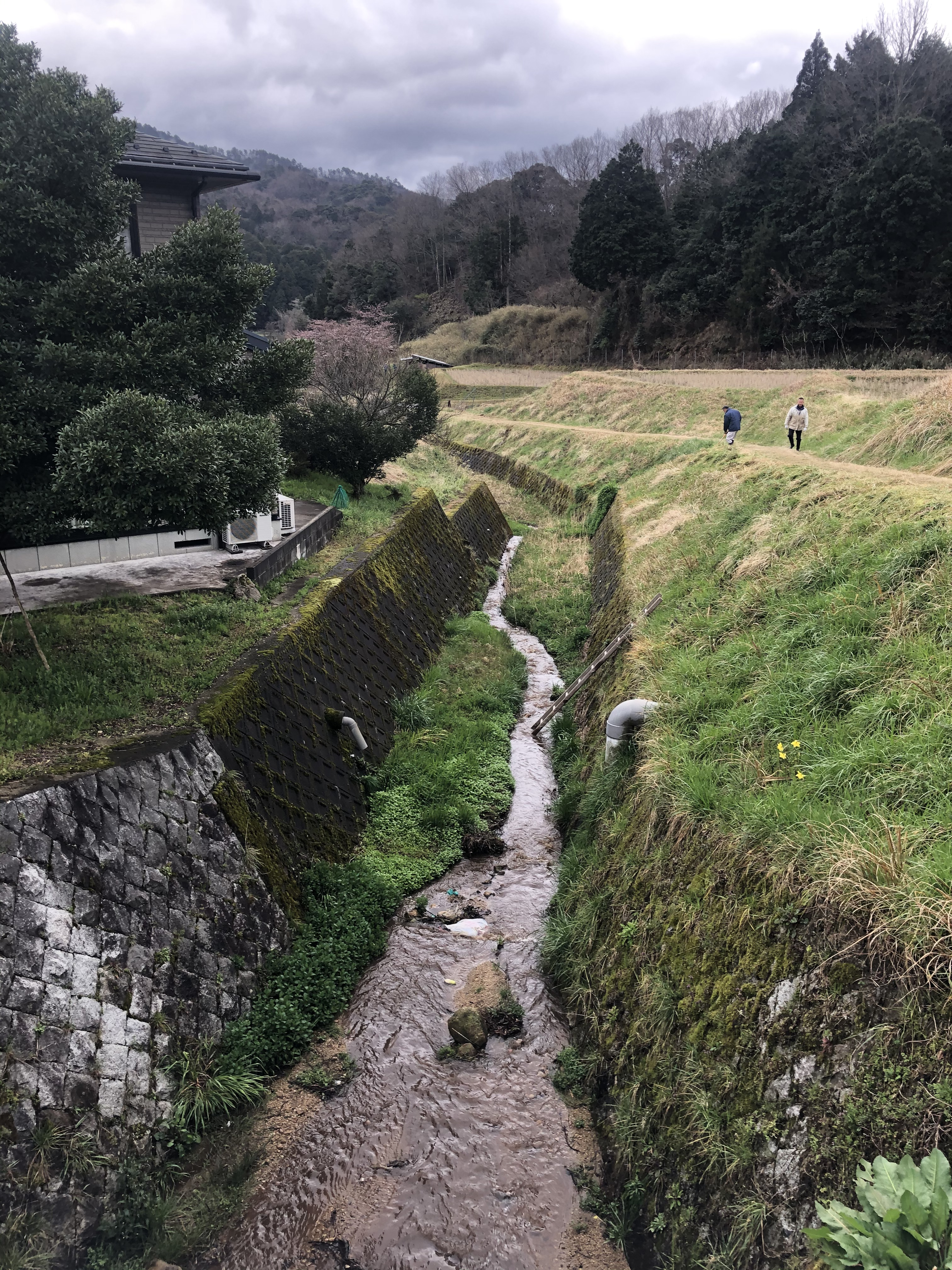 下常吉区内、天谷川を天谷橋から川下に向けて撮影